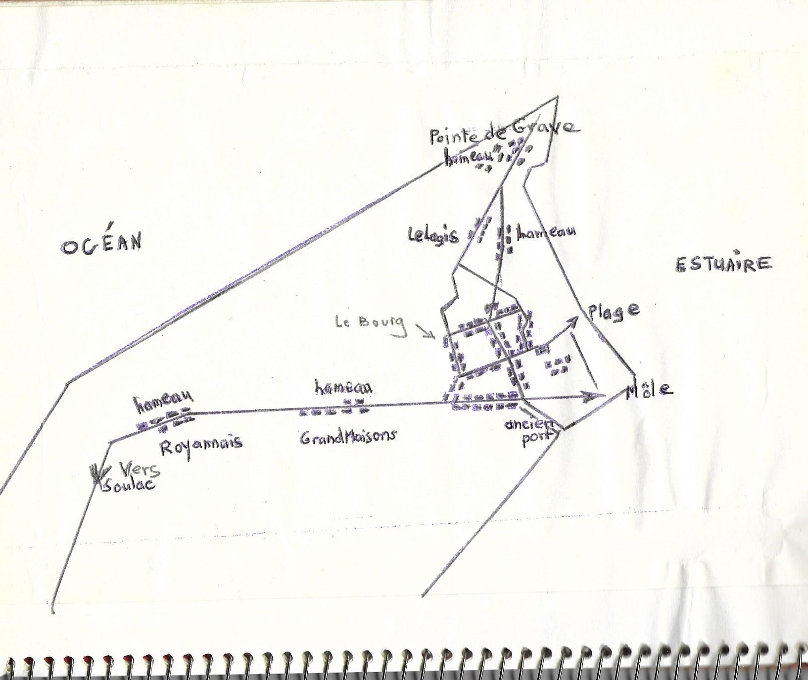 Plan Le Verdon-sur-mer (hameaux)